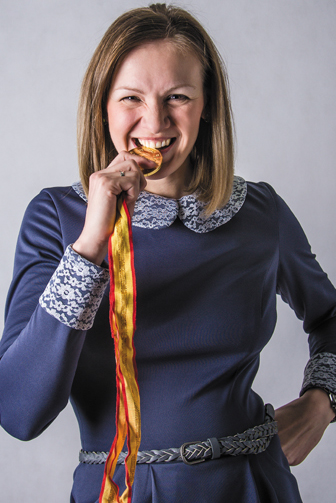 Анна Седойкина. Российская гандболистка, вратарь сборной России и волгоградского «Динамо», заслуженный мастер спорта, чемпионка мира, призер чемпионата Европы, многократная чемпионка России, обладатель Кубка ЕГФ. Фотография из серии «Лица эстафеты».